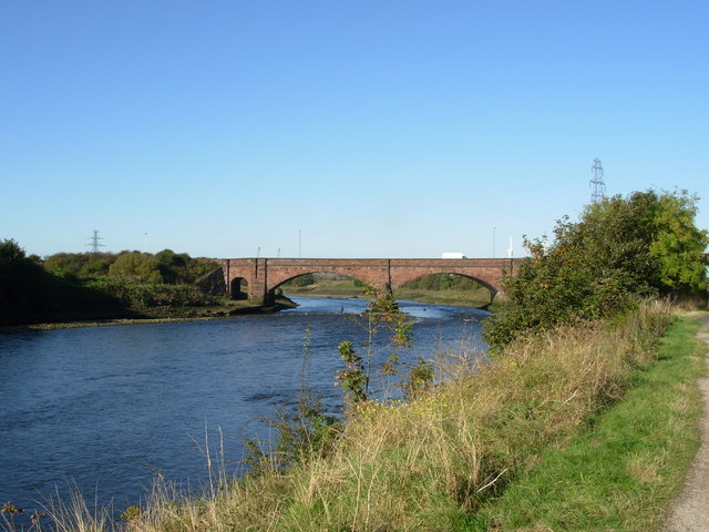 Bridge over the Derwent